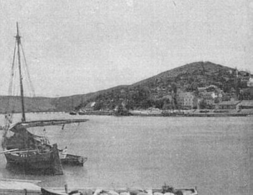 Um den Hafen Metković zu erreichen, mussten die Schiffe die seit 1888 regulierte Naranta flussaufaufwärts befahren.